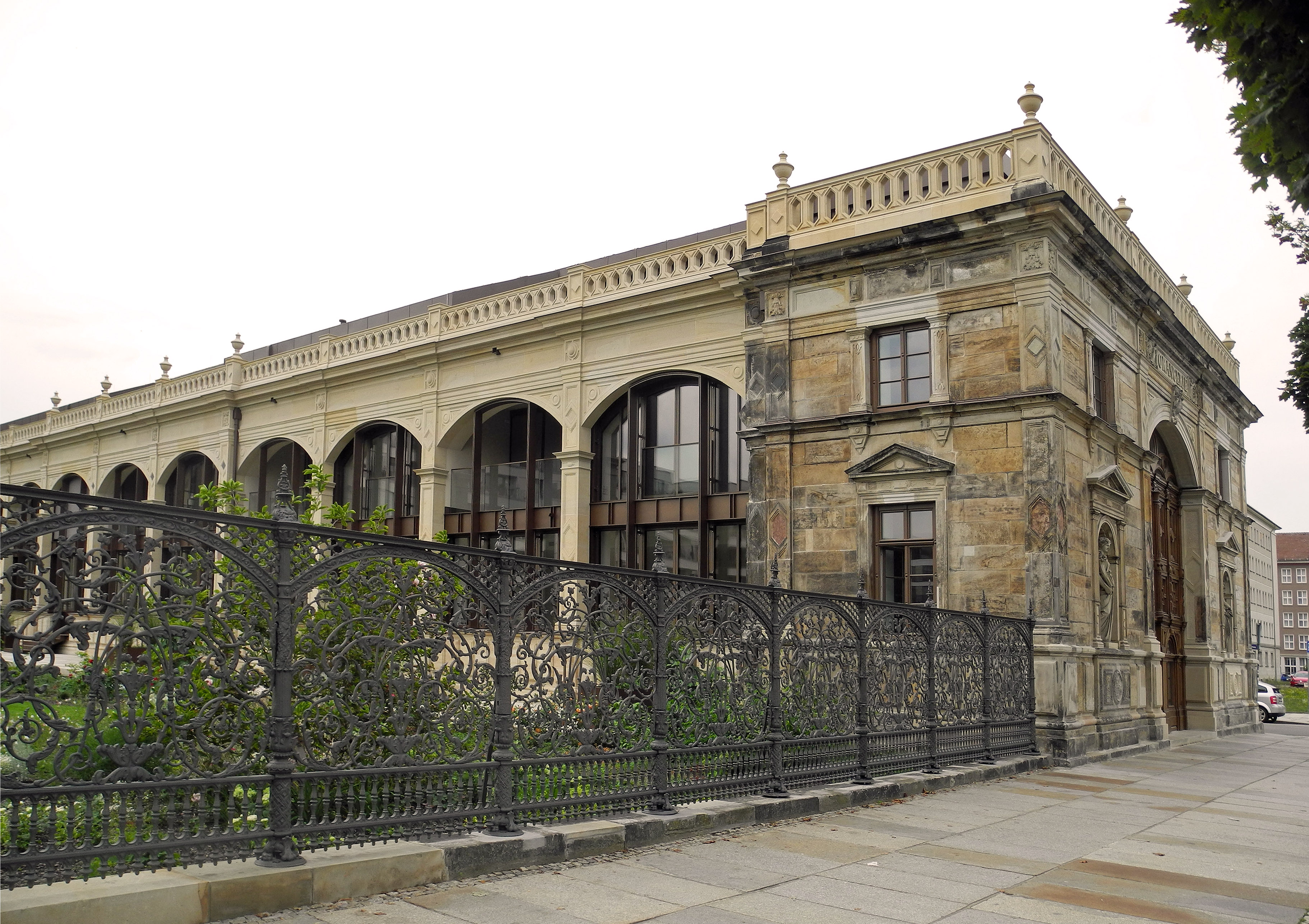 Neuer Zaun an der ehem. Orangerie „Der Herzogin Garten“ in Dresden. Die Gartenanlage an der Orangerie „Der Herzogin Garten“ in Dresden an der Ostra-Allee wurde ab August 2019 der Öffentlichkeit während der Tageszeit zugänglich gemacht.